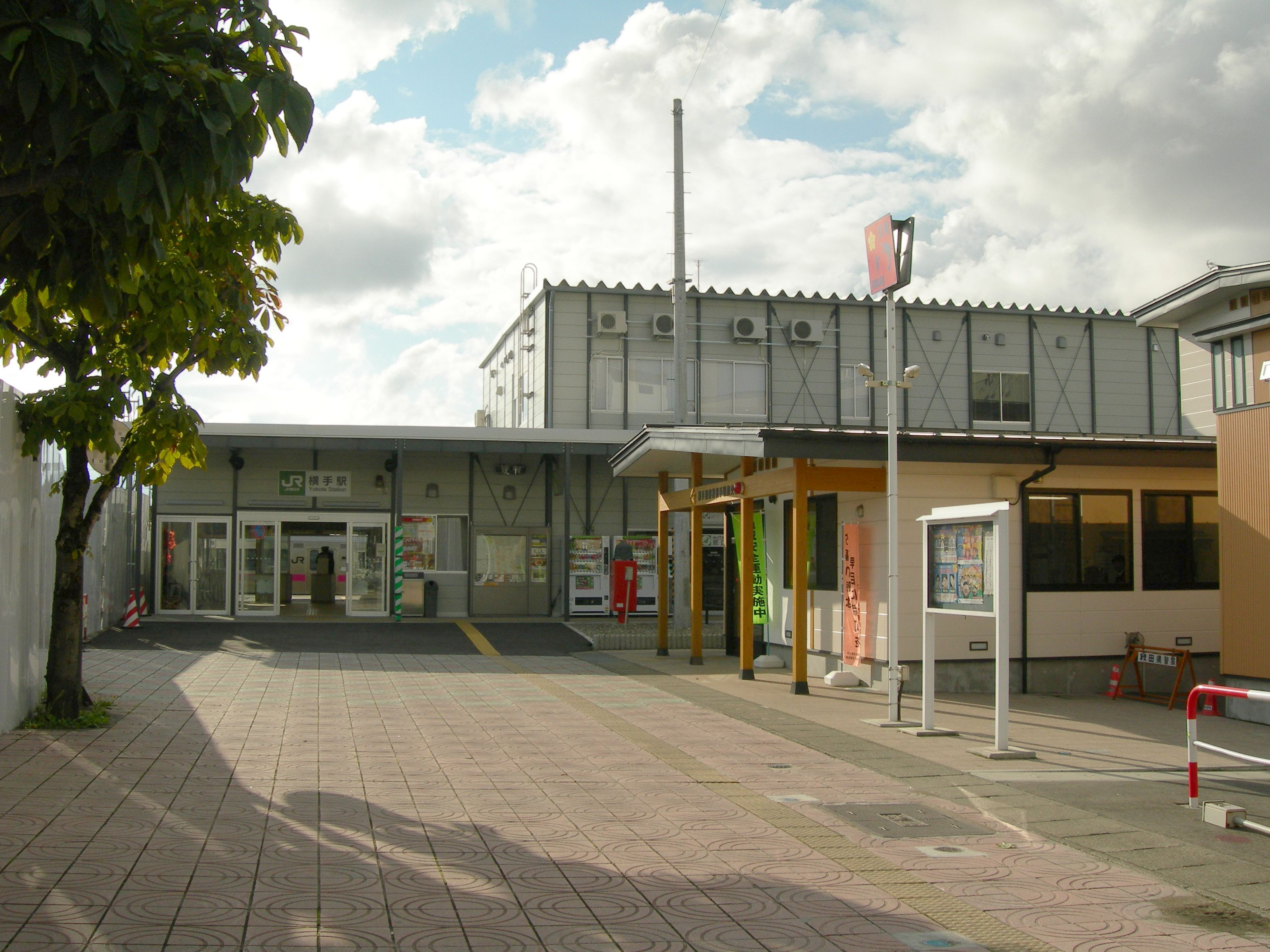 横手駅仮設駅舎